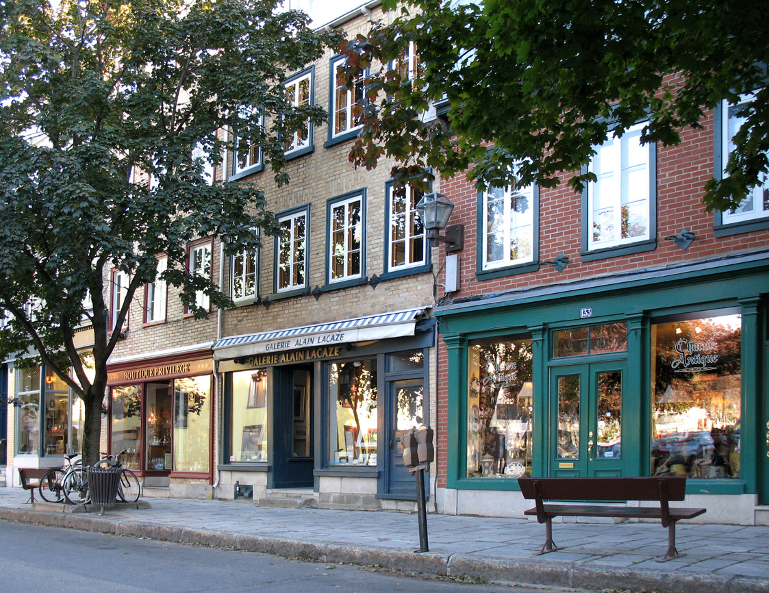 Rue Saint-Paul, Québec (Québec) Canada. Au centre, la maison Anne-Hamilton, à droite au 133, la maison Jean-Étienne-Jayac, classées monuments historiques.